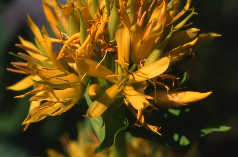 Gentiana lutea, Bious Artigues (64)